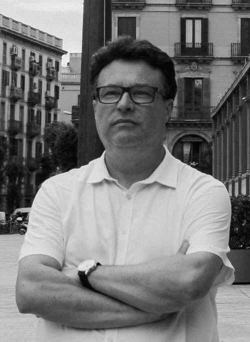 Joan Josep Nuet a la Plaça Comercial de Barcelona davant El Born Centre de Cultura i Memòria